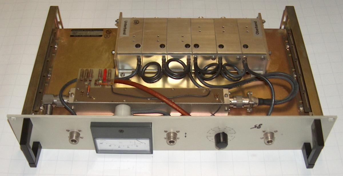 Professionelle Feststation VHF-Duplexweiche für 19" Schrank, mit internemReflektometer und Stehwellenmessgerät auf der Frontplatte Fabrikat Kathrein